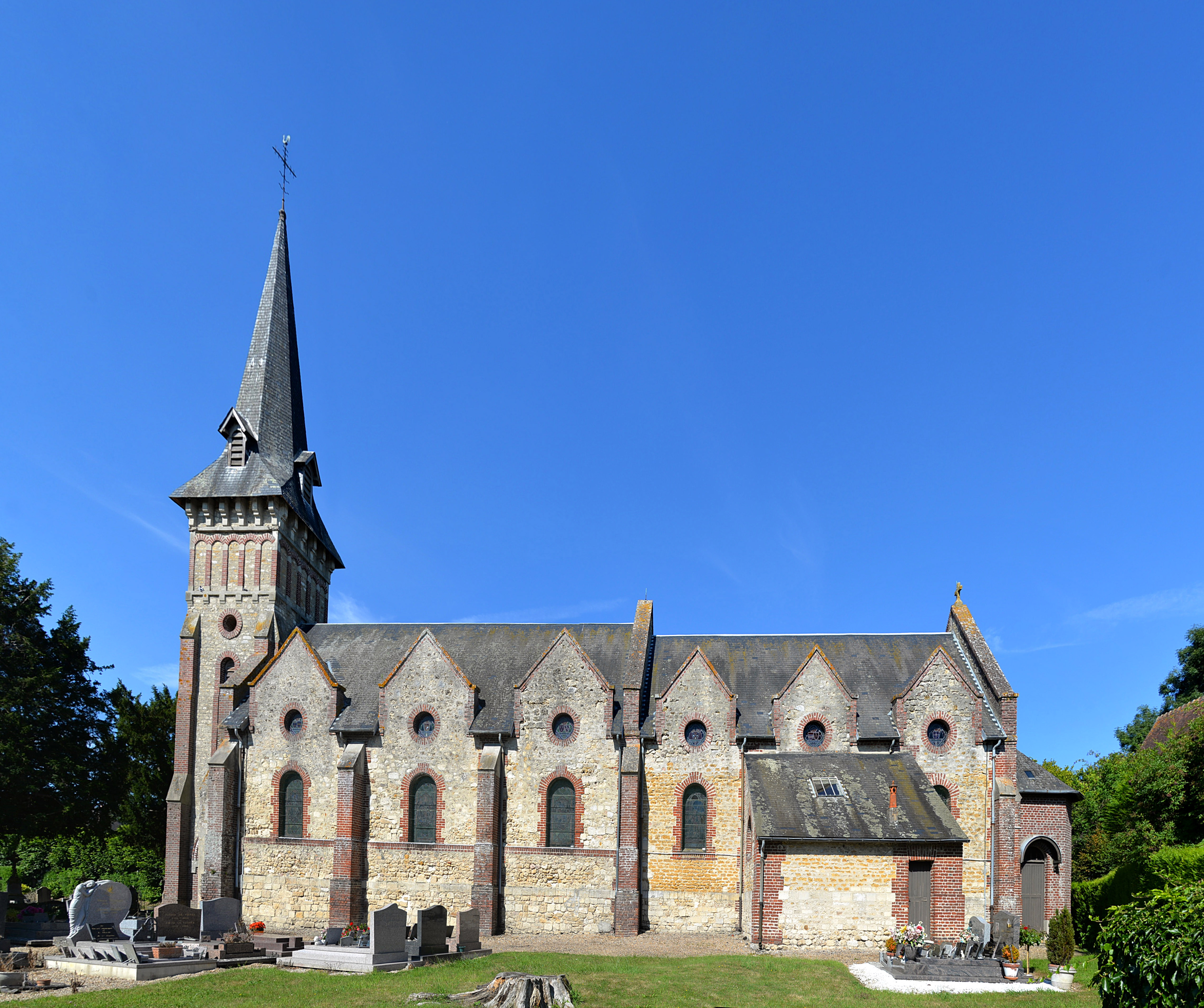 Canapville (Calvados)